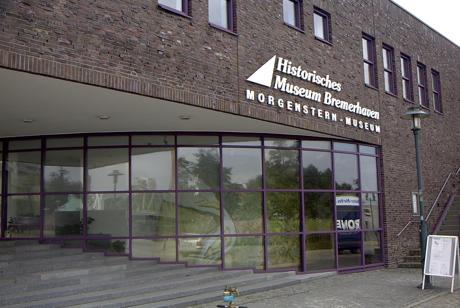 Historisches Museum Bremerhaven eingang.